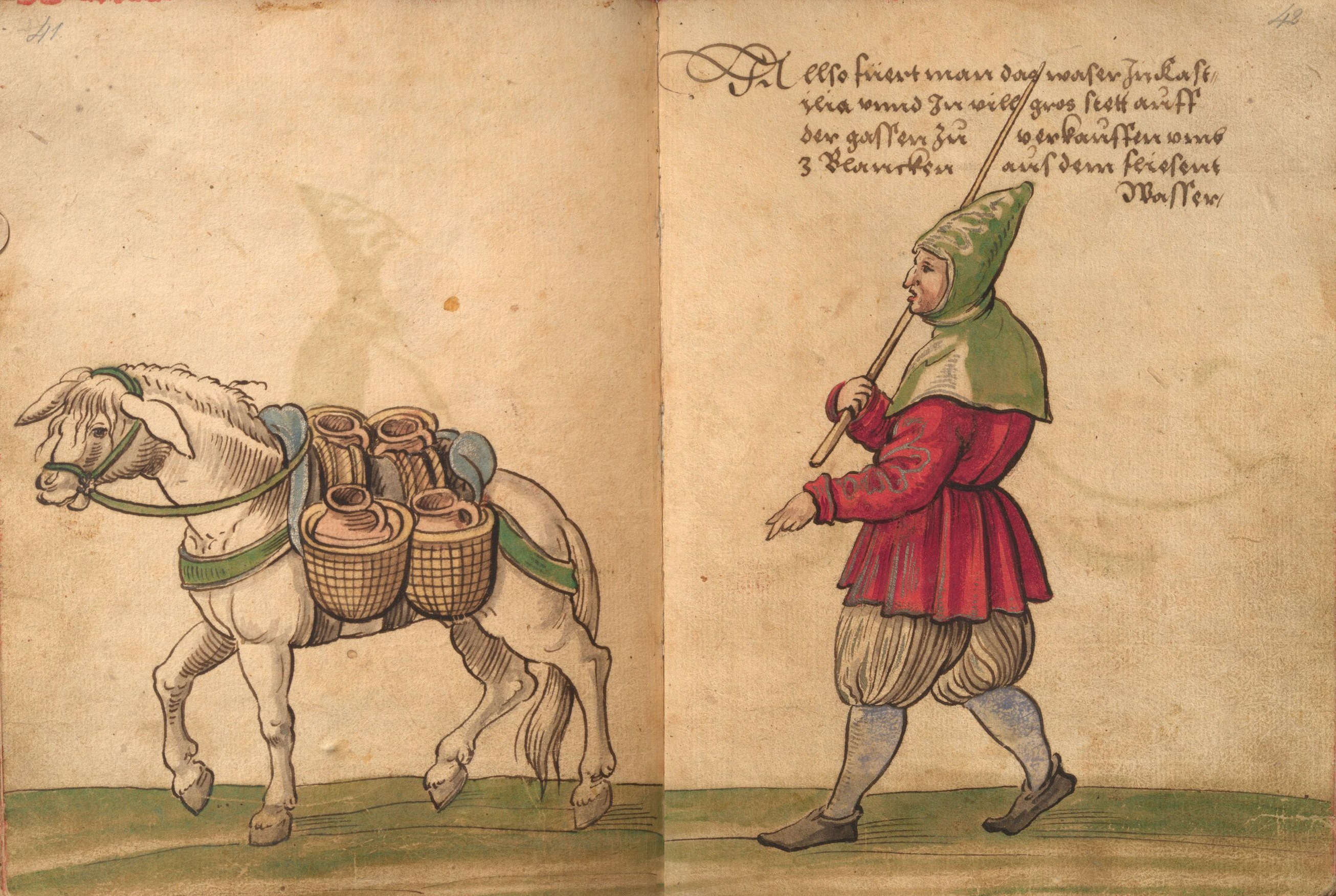 "Trachtenbuch" des Christoph Weiditz, Germanisches Nationalmuseum Nürnberg, Hs. 22474. Bl. 41-42 Kastilianischer Wasserverkäufer